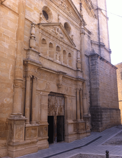 Cretas/Queretes. Matarraña/Matarranya. Aragón/Aragó Iglesia de la Asunción. Portada